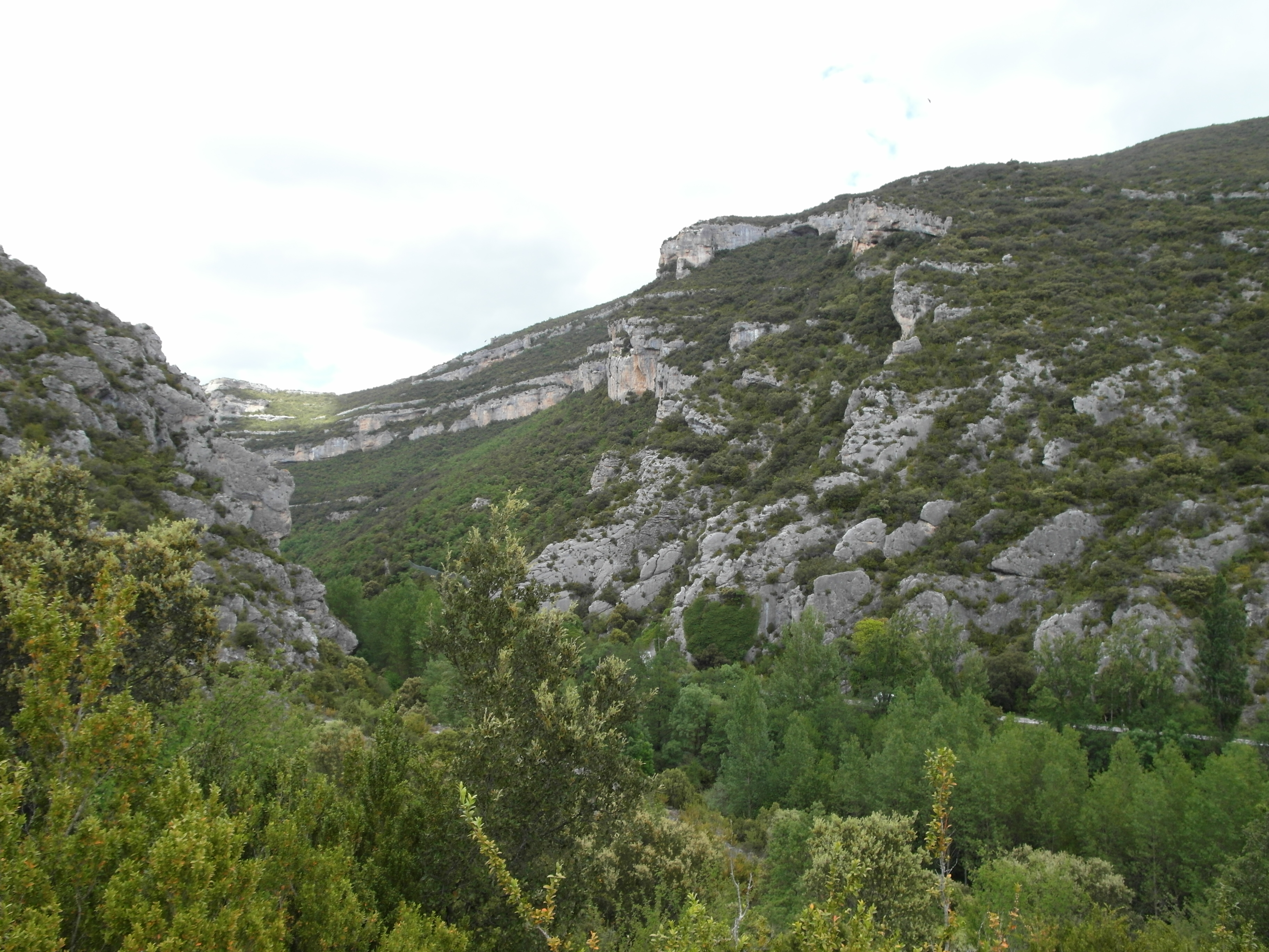 Desfiladero de Los Hocinos, Burgos.